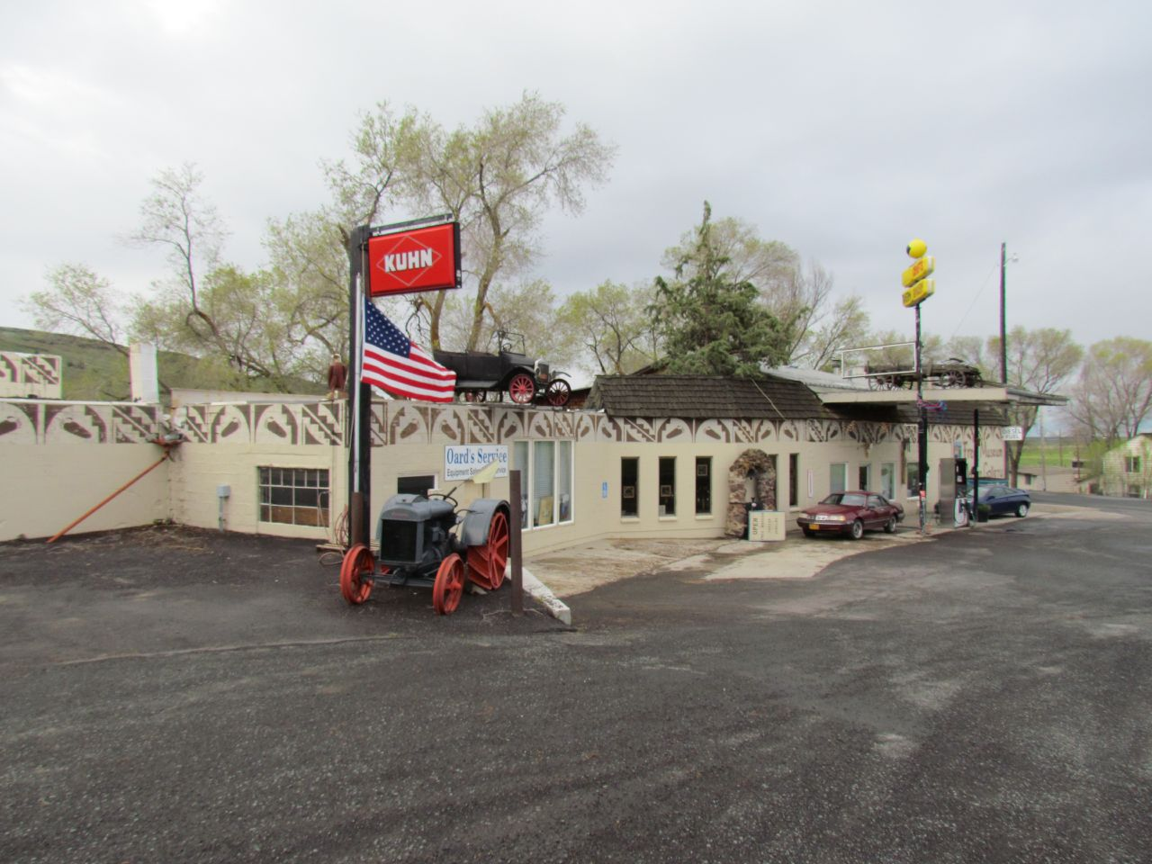 Oard's